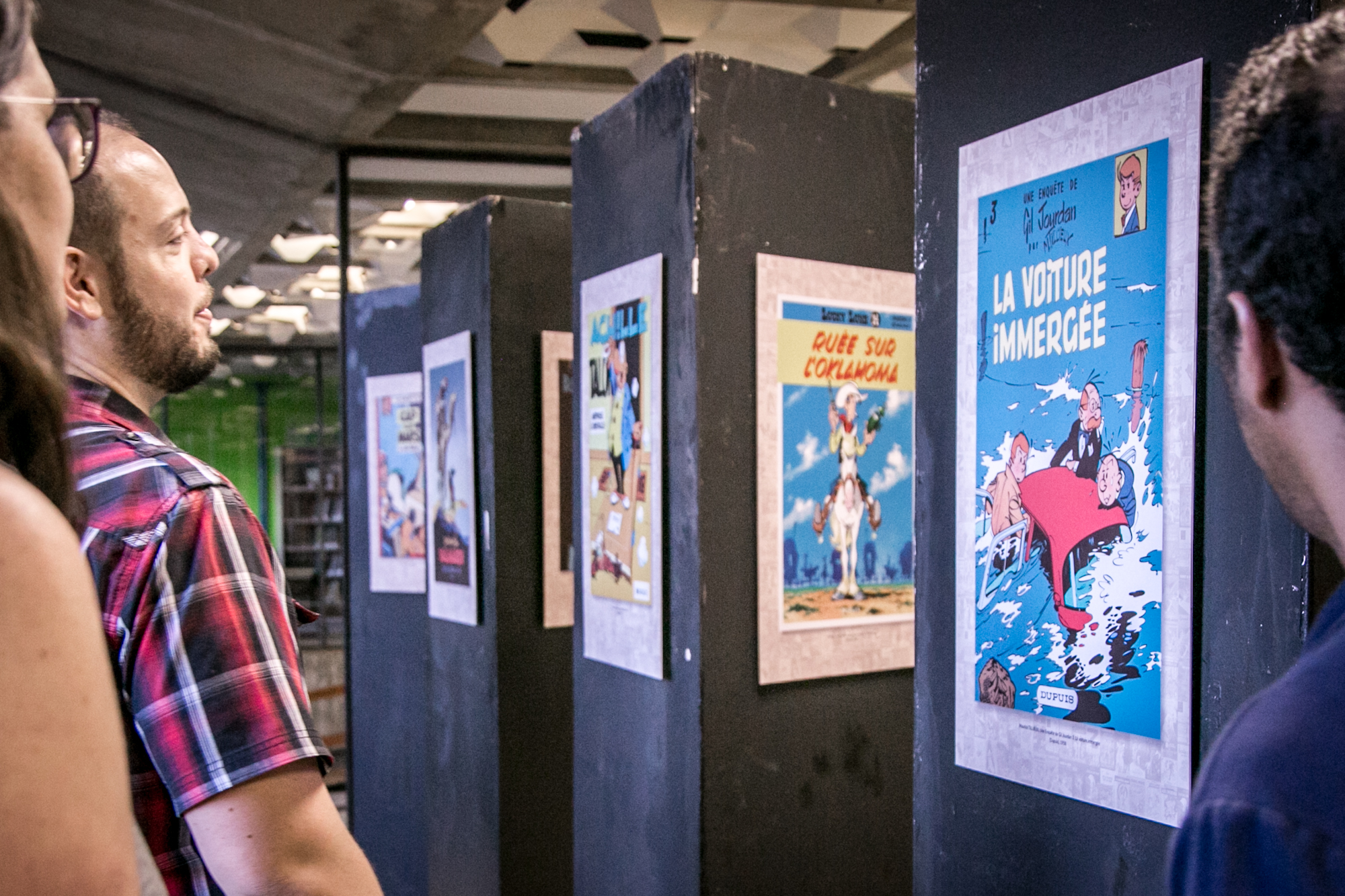 Brasília, 11 de Junho de 2018. Exposição sobre o tema está aberta a visitação até 17 de junho. Biblioteca também inaugurou ambiente lúdico para pesquisa e estudo do universo pop. Foto: Beto Monteiro / Secom UnB. Confira a matéria completa no portal da UnB: ATENÇÃO – As informações, as fotos e os textos podem ser usados e reproduzidos, integral ou parcialmente, desde que a fonte seja devidamente citada e que não haja alteração de sentido em seus conteúdos. Crédito para textos: nome do repórter/Secom UnB ou Secom UnB. Crédito para fotos: nome do fotógrafo/Secom UnB.